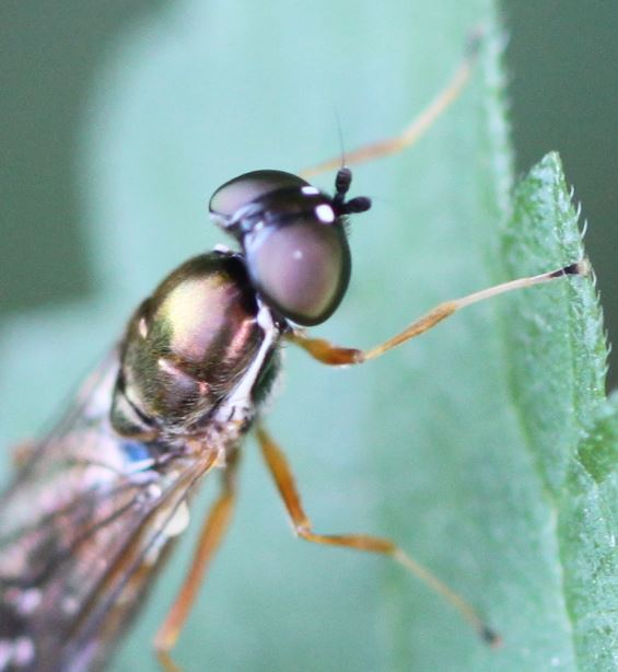 Sargus bipunctatus, Weibchen, am 15. September 2018 in der Schwetzinger Hardt